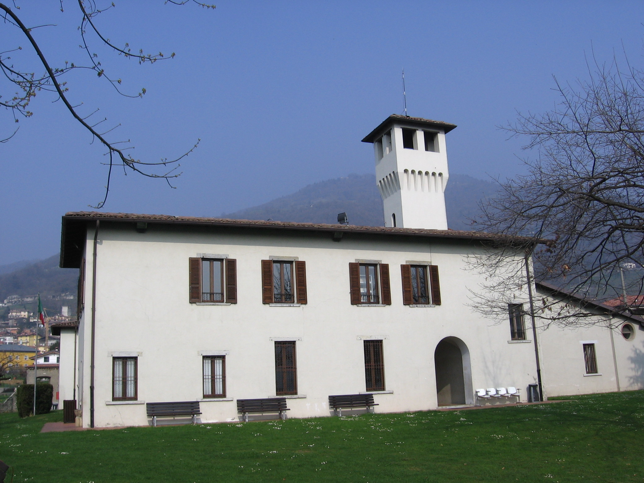 Vertova, Bergamo, Italia